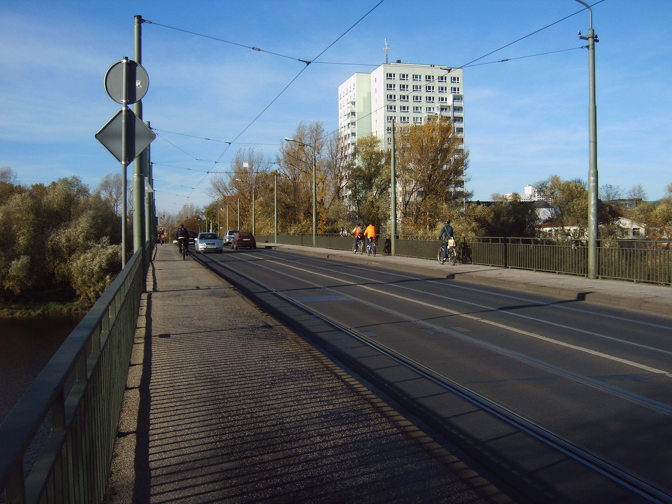 Anna-Ebert-Brücke in Magdeburg, Germany; Blick auf den Werder